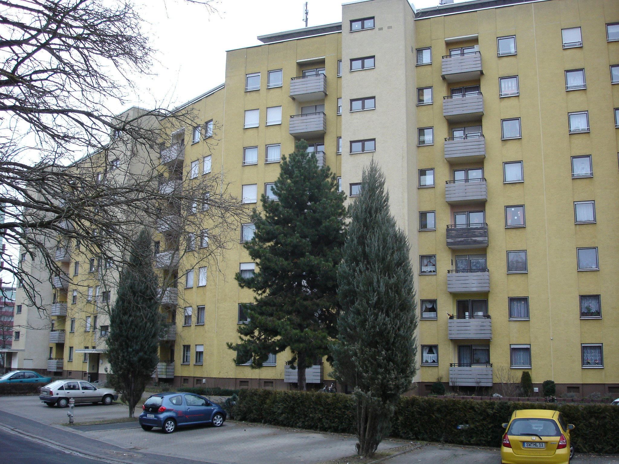 Kreuzbergstr. 2-10